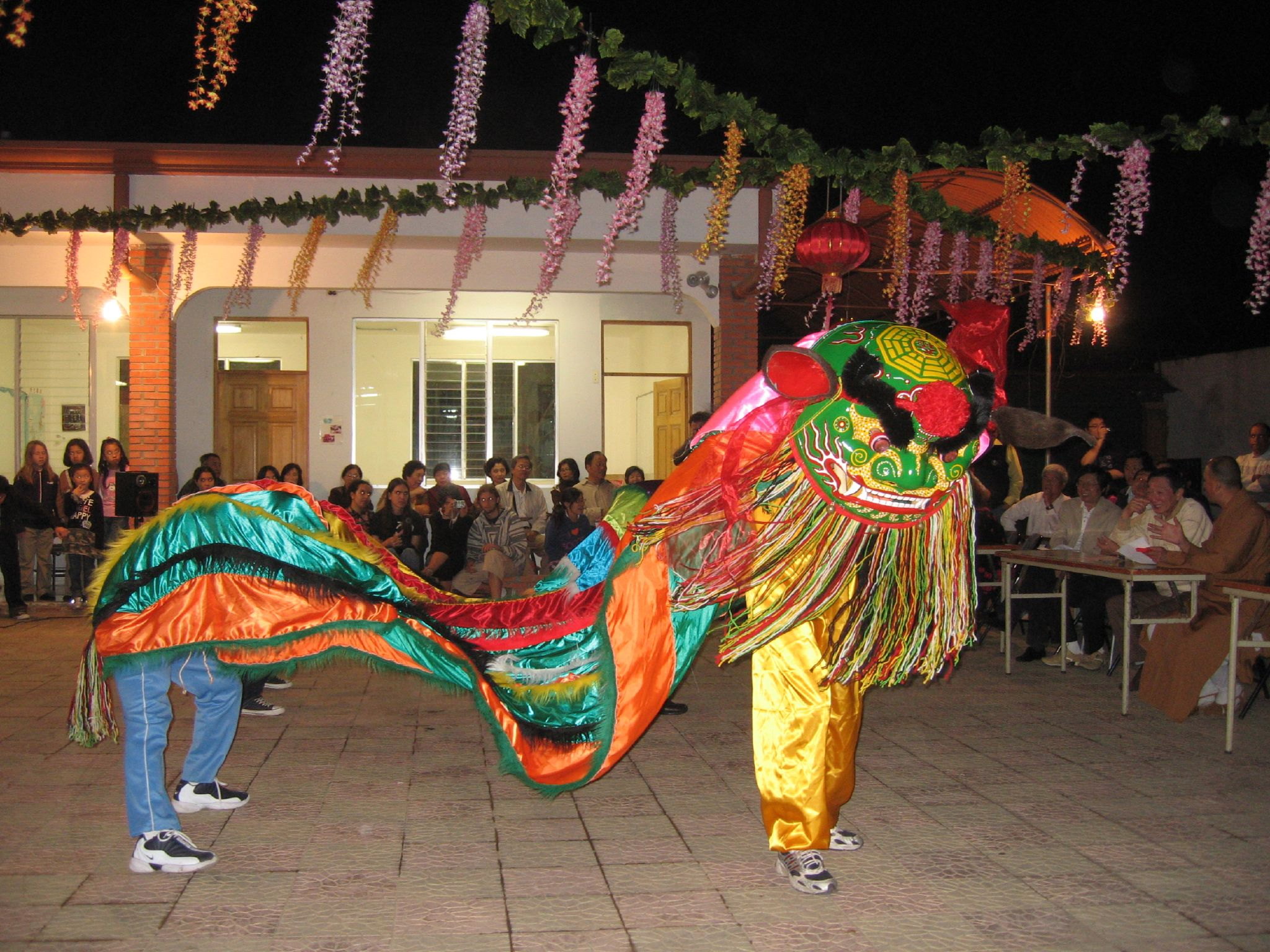 Celebración del Año Nuevo Chino en Puntarenas, Costa Rica.